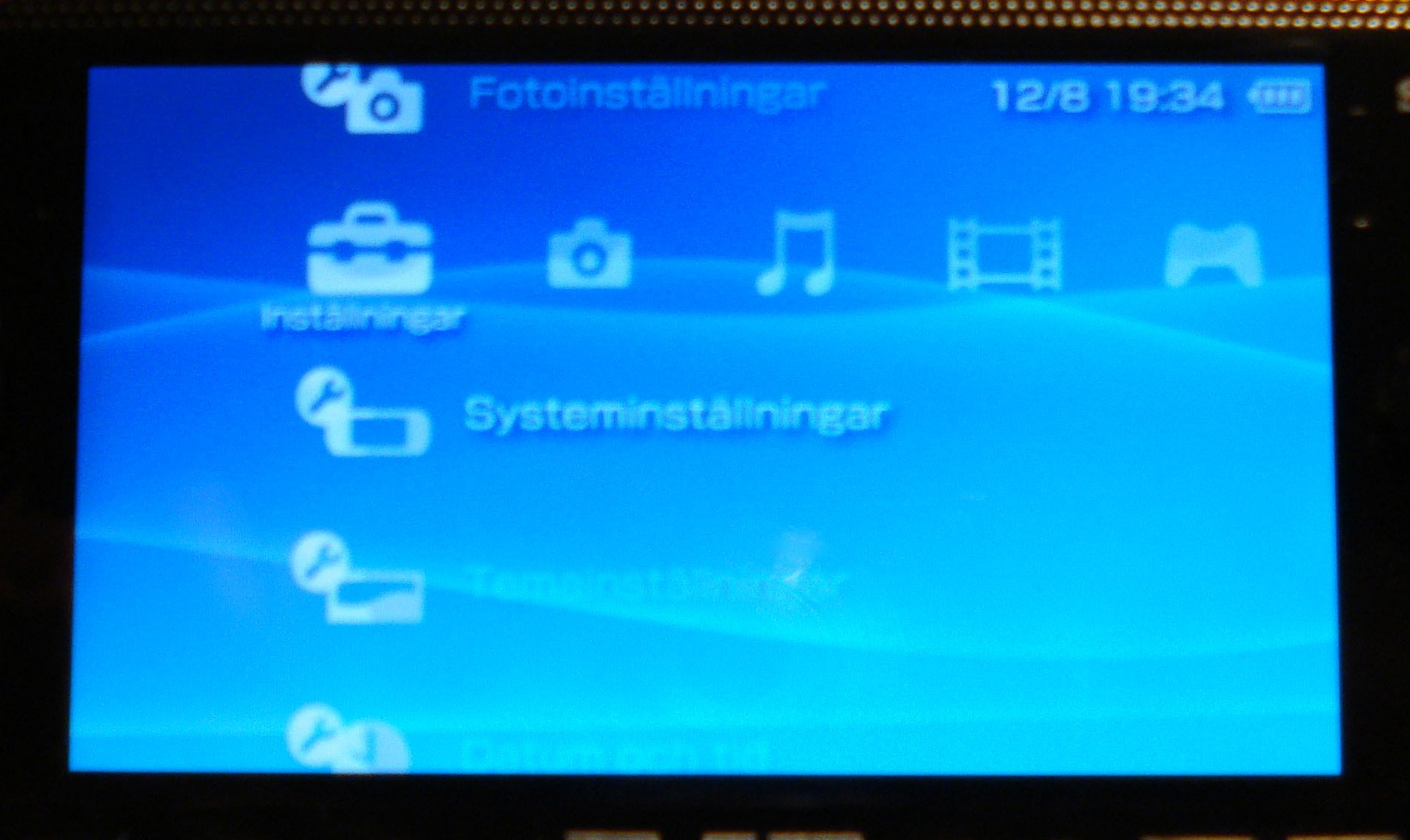 En bild på ett hackat psp med svenska menyer, något som inte stöds officiellt.